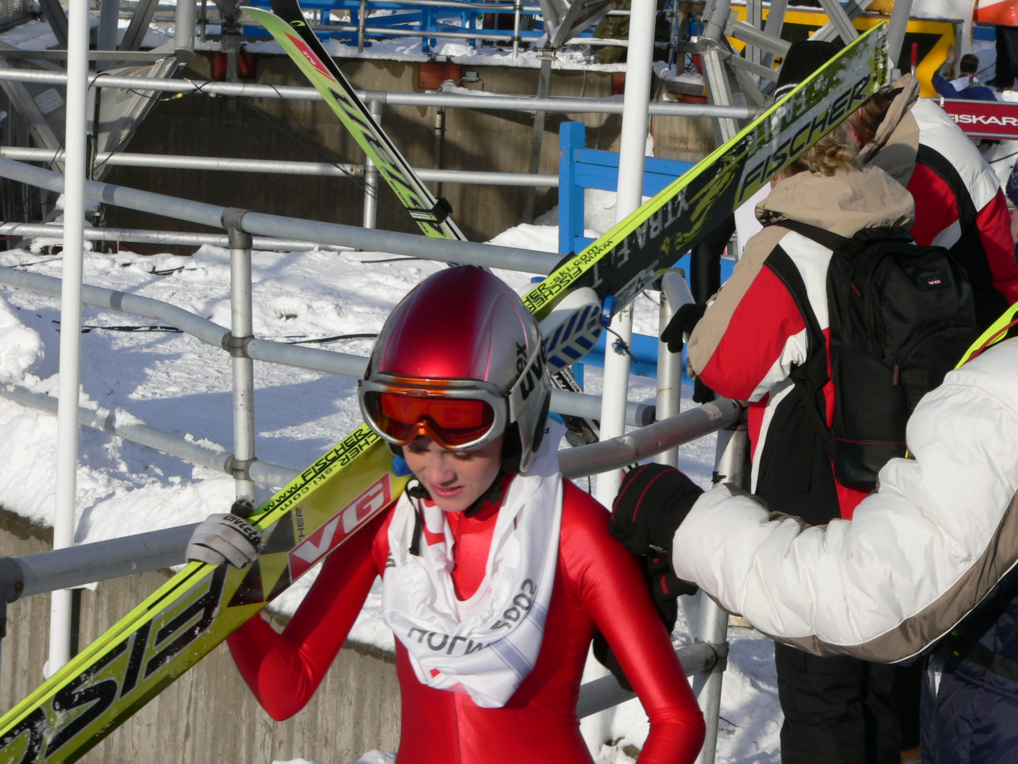 From the 2005 COC ski jumping event in Holmenkollen.